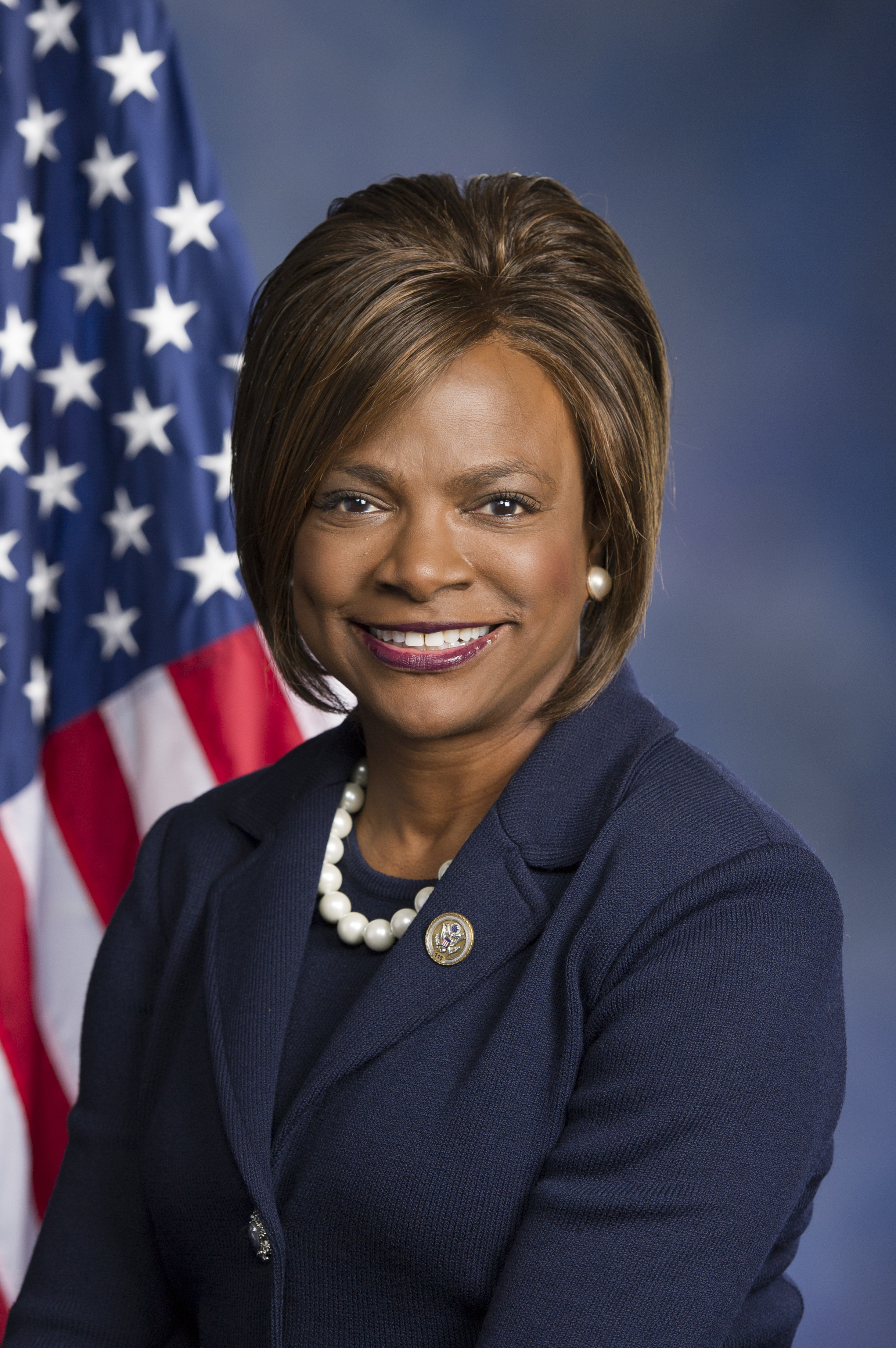 US Rep. Val Demings, 2017